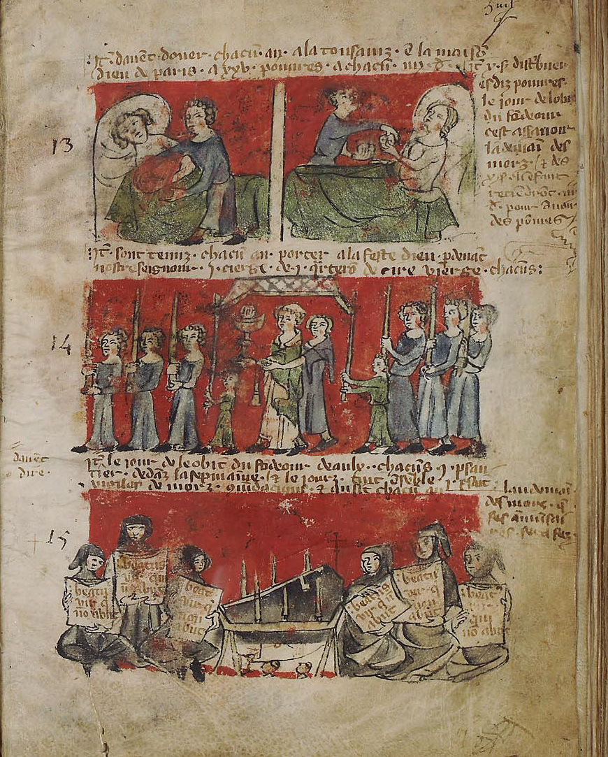 Livre des statuts du collège de Hubant à Paris ( 1346-1541)